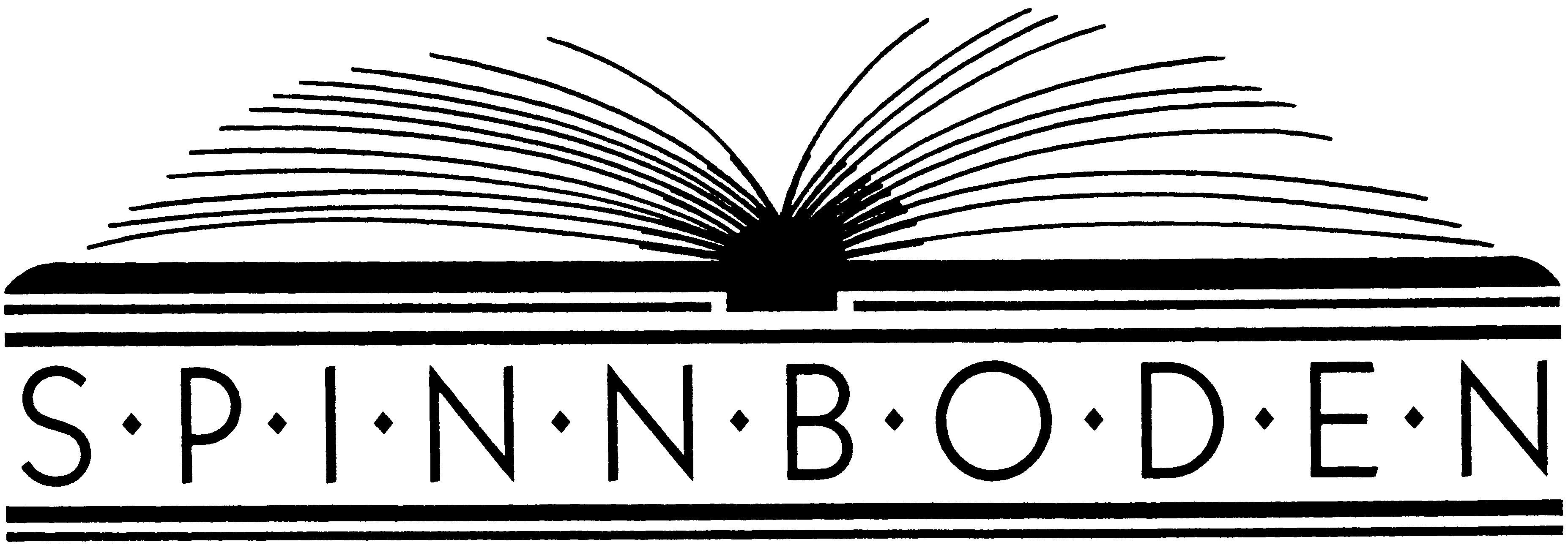 Logo von SPINNBODEN Archiv zur Entdeckung und Bewahrung von Frauenliebe e.V.